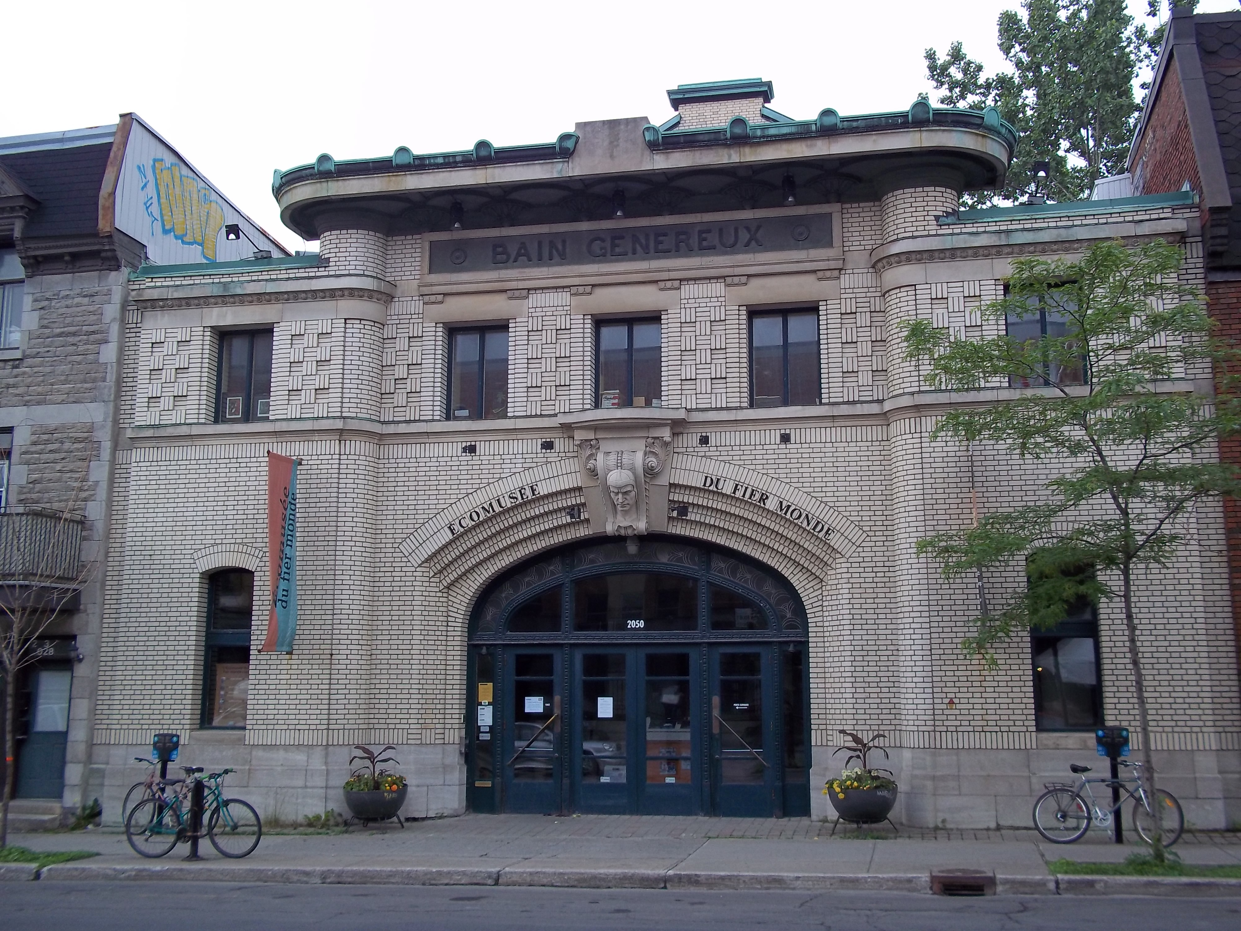 Écomusée du fier monde, rue Amherst, Montreal